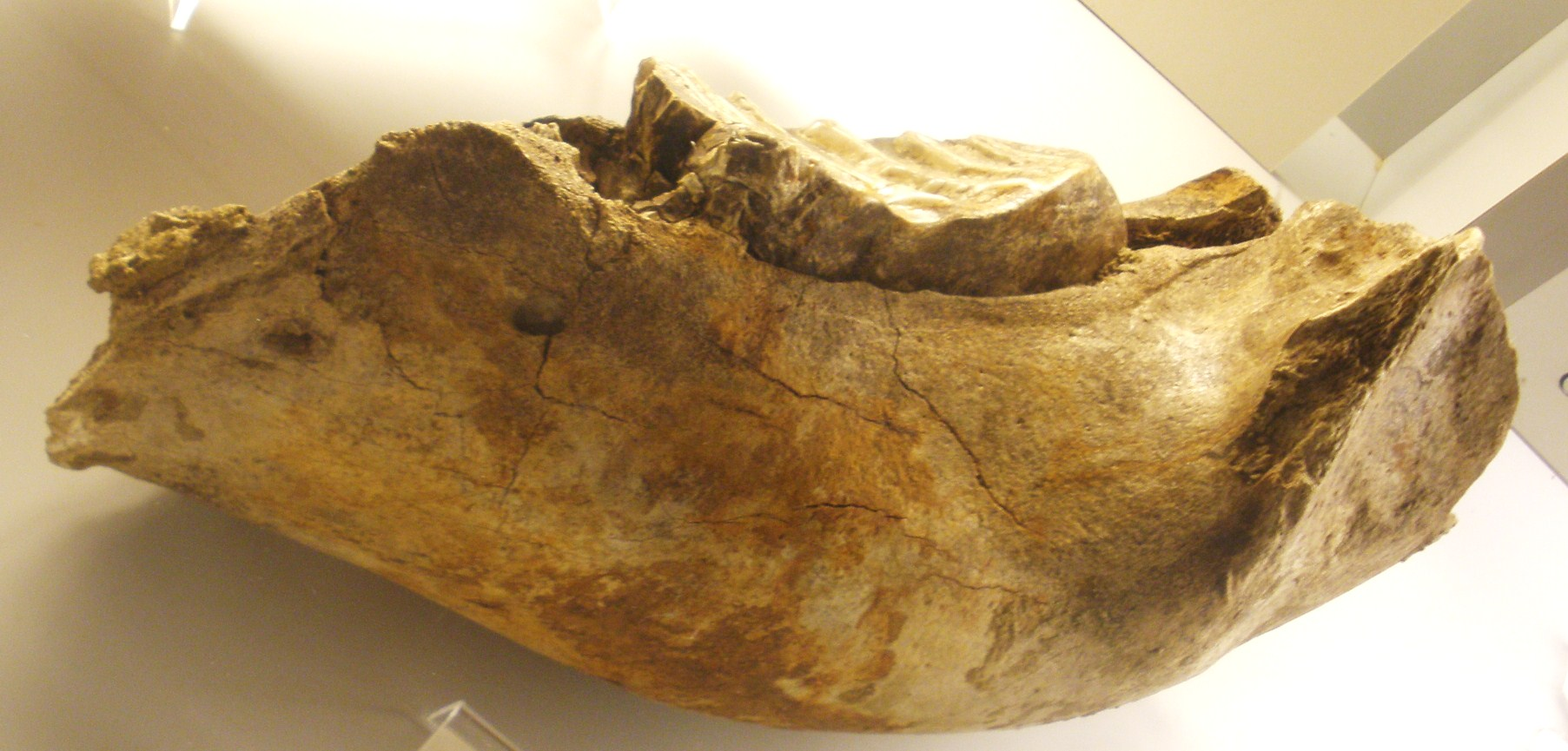 Fossil of Elephas mnaidriensis, an extinct mammal - Took the picture at Museo di Paleontologia di Firenze